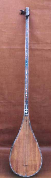 Dotar